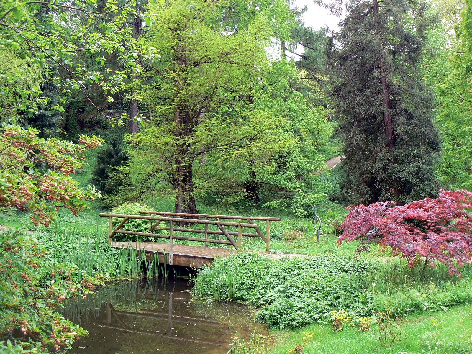 Alter Botanischer Garten Kiel: Blick über den Teich auf eine Sumpfzypresse und einen Küstenmammutbaum.